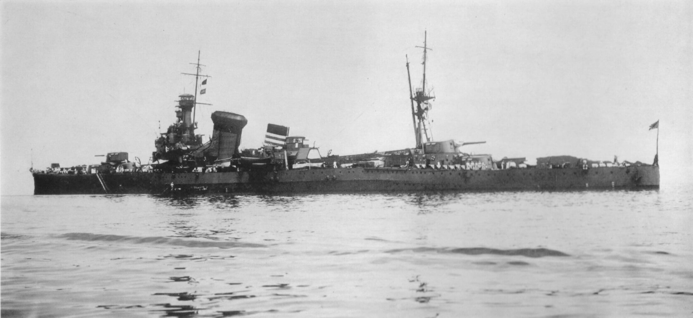 Тяжёлый крейсер «Како» в Курэ 21 июня 1928 года. Видны стартовая платформа и экспериментальный дождезащитный колпак на первой дымовой трубе.